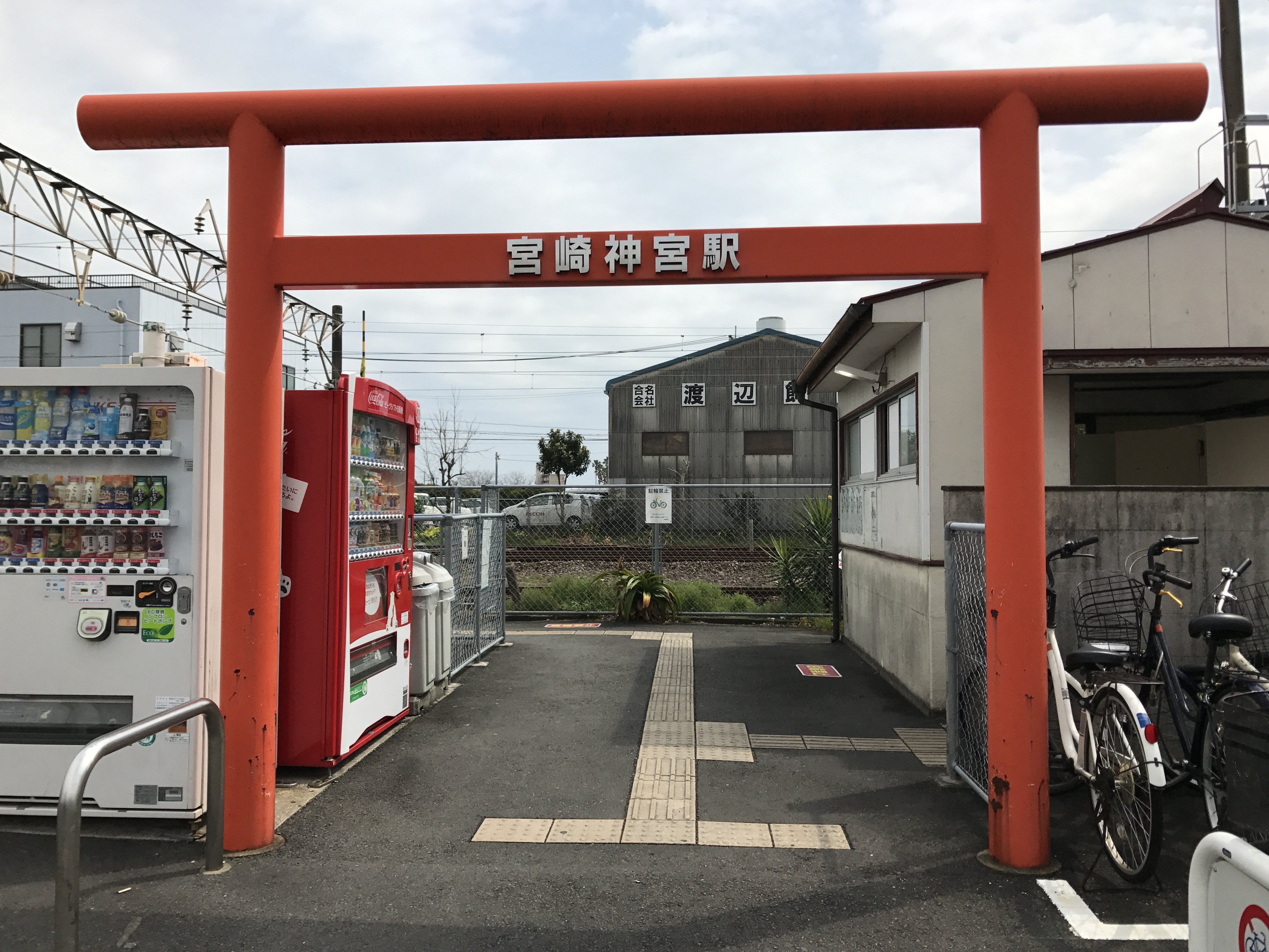 宮崎神宮駅の入り口